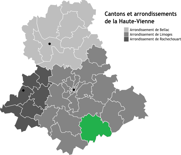 Canton de Saint-Germain-les-Belles, Limousin, France en Carte des arrondissements de la Haute-Vienne